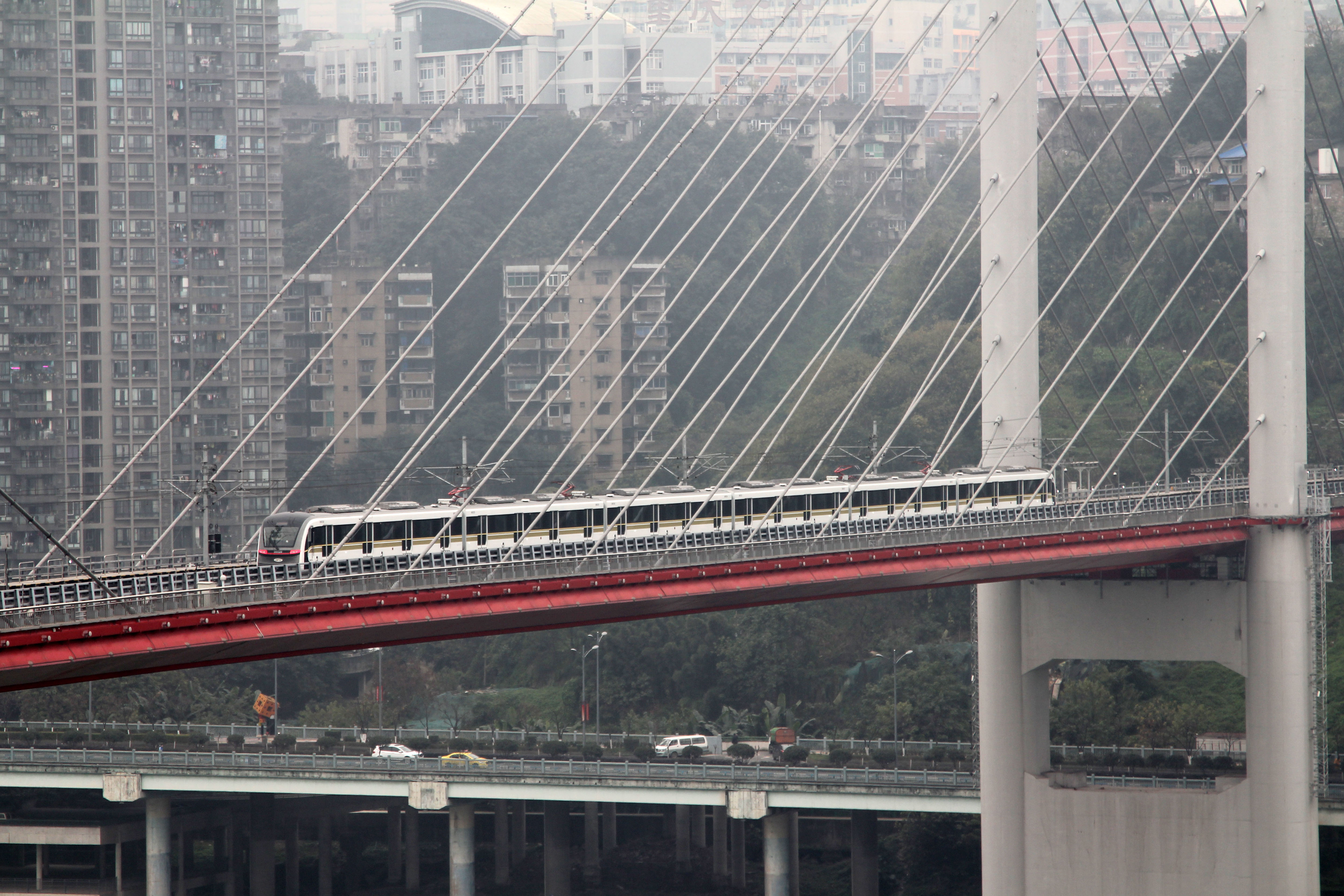 中文（中国大陆）: 重庆轨道交通环线列车于高家花园轨道专用桥